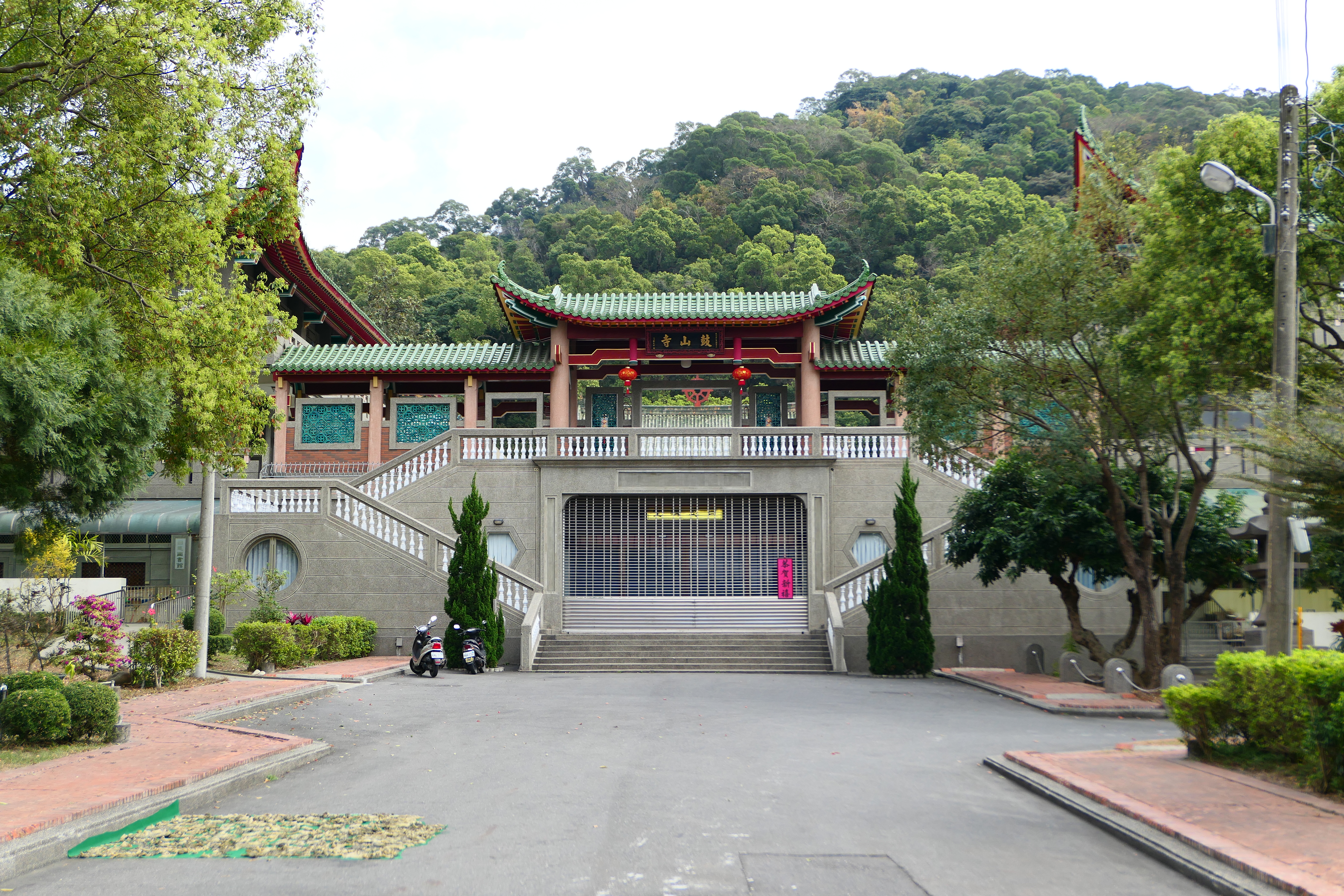 中文（台灣）: 從外面拍攝的田中鼓山寺外觀